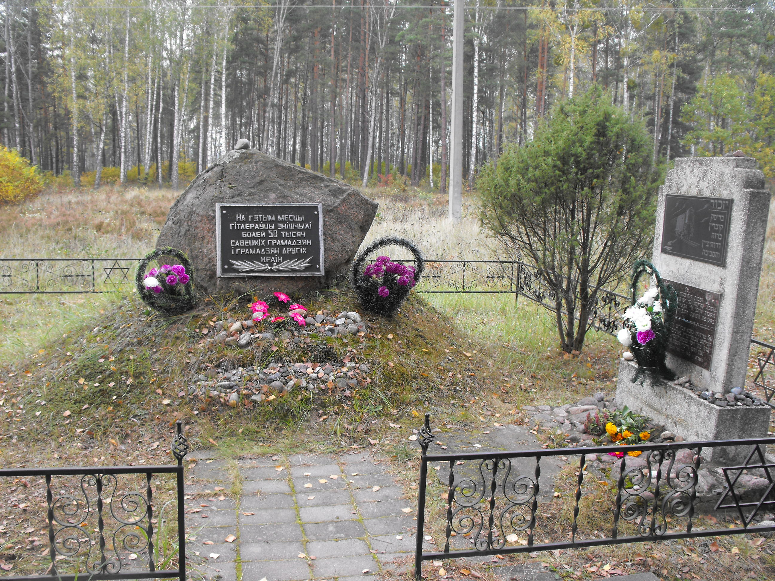 Бронная Гора. Памятник на месте массовых убийств евреев во время Холокоста.